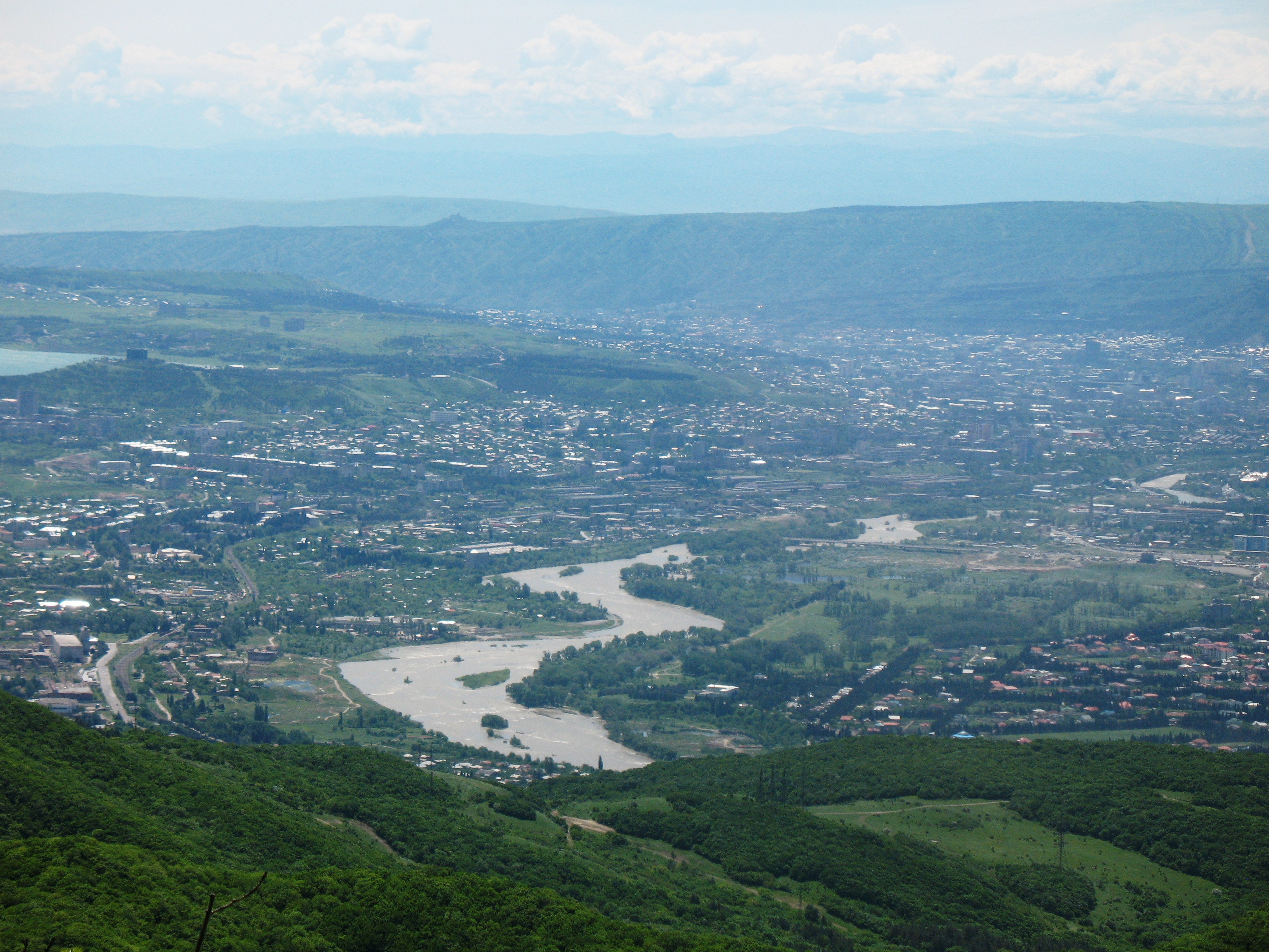 Blick von Sedaseni auf Tiflis